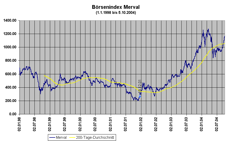 Der argentinische Aktienindex Merval (01-01-1998 bis 05-10-2004)